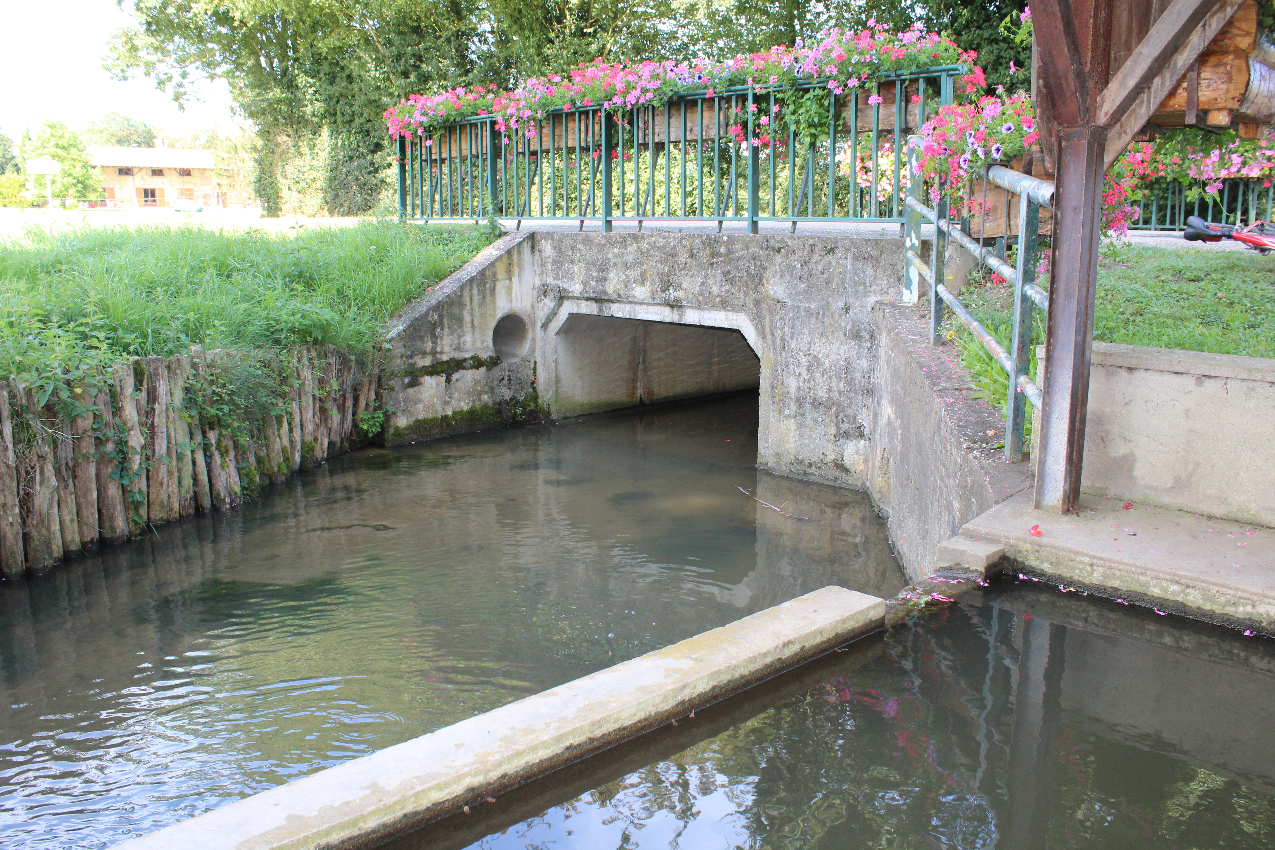 Lavoir de Saint-Julien-sur-Veyle.